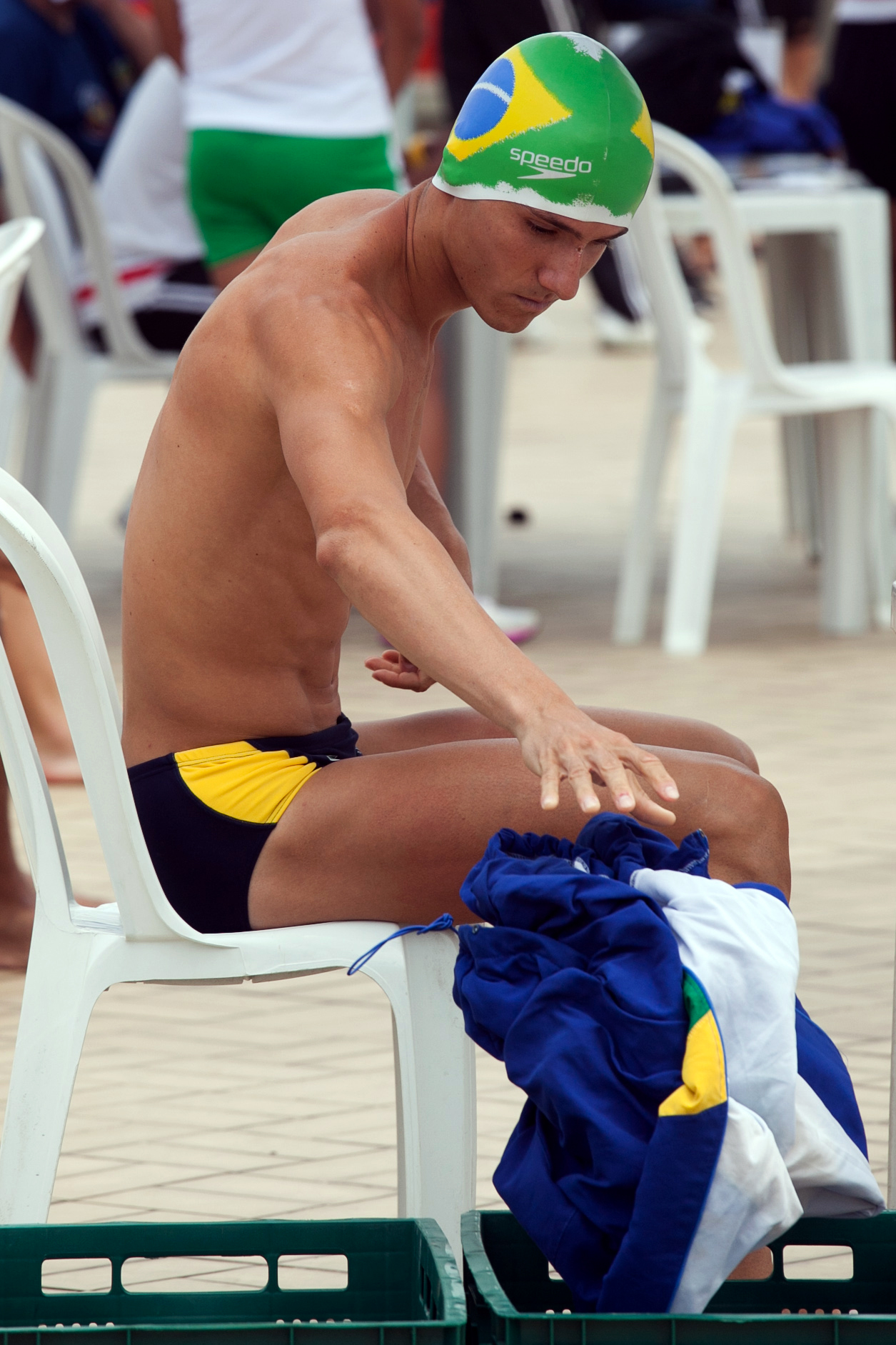 9 a 18/11/2013, Rio de Janeiro - RJ. Fotos: Felipe Barra